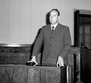 Politico italiano